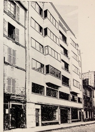 Bruno Elkouken (Français d'origine polonaise, 1893-1968): Immeuble 138 rue du Théâtre, 1931, façade, XVe arrondissement, Paris, France.